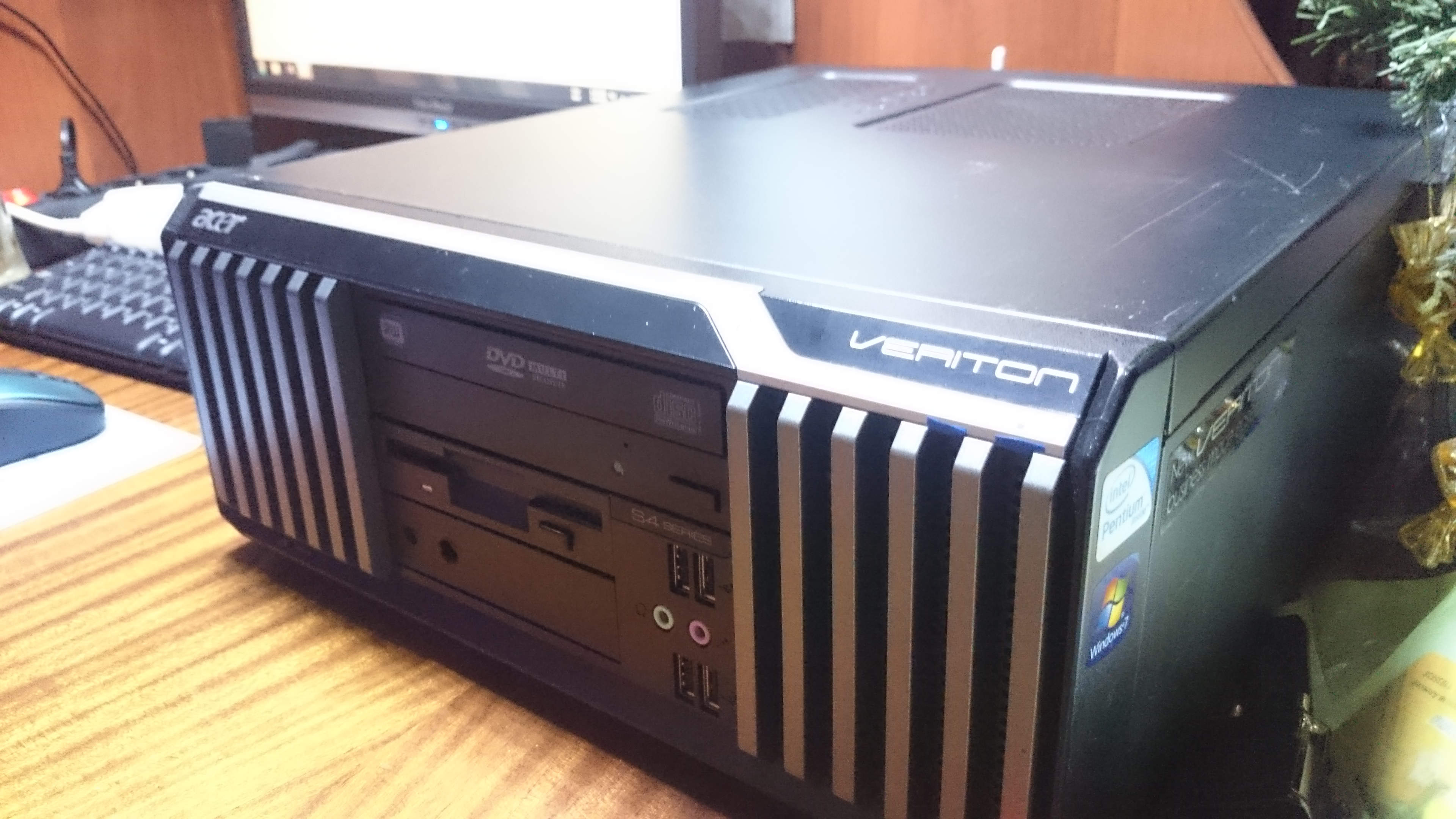 Компьютер Acer серии Veriton модель S480G